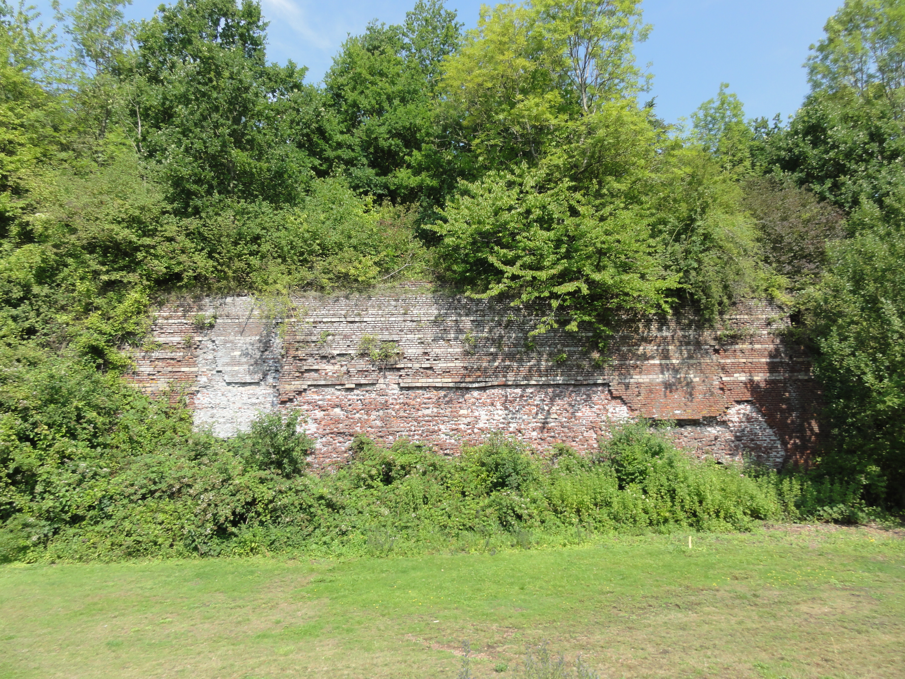 La Fosse de Fléchinelle de la Compagnie des mines de la Lys-Supérieure, devenue la Fosse n° 1 - 1 bis de la Compagnie des mines de Ligny-lès-Aire était un charbonnage constitué de deux puits situé à Enquin-les-Mines, Pas-de-Calais, Nord-Pas-de-Calais, France.